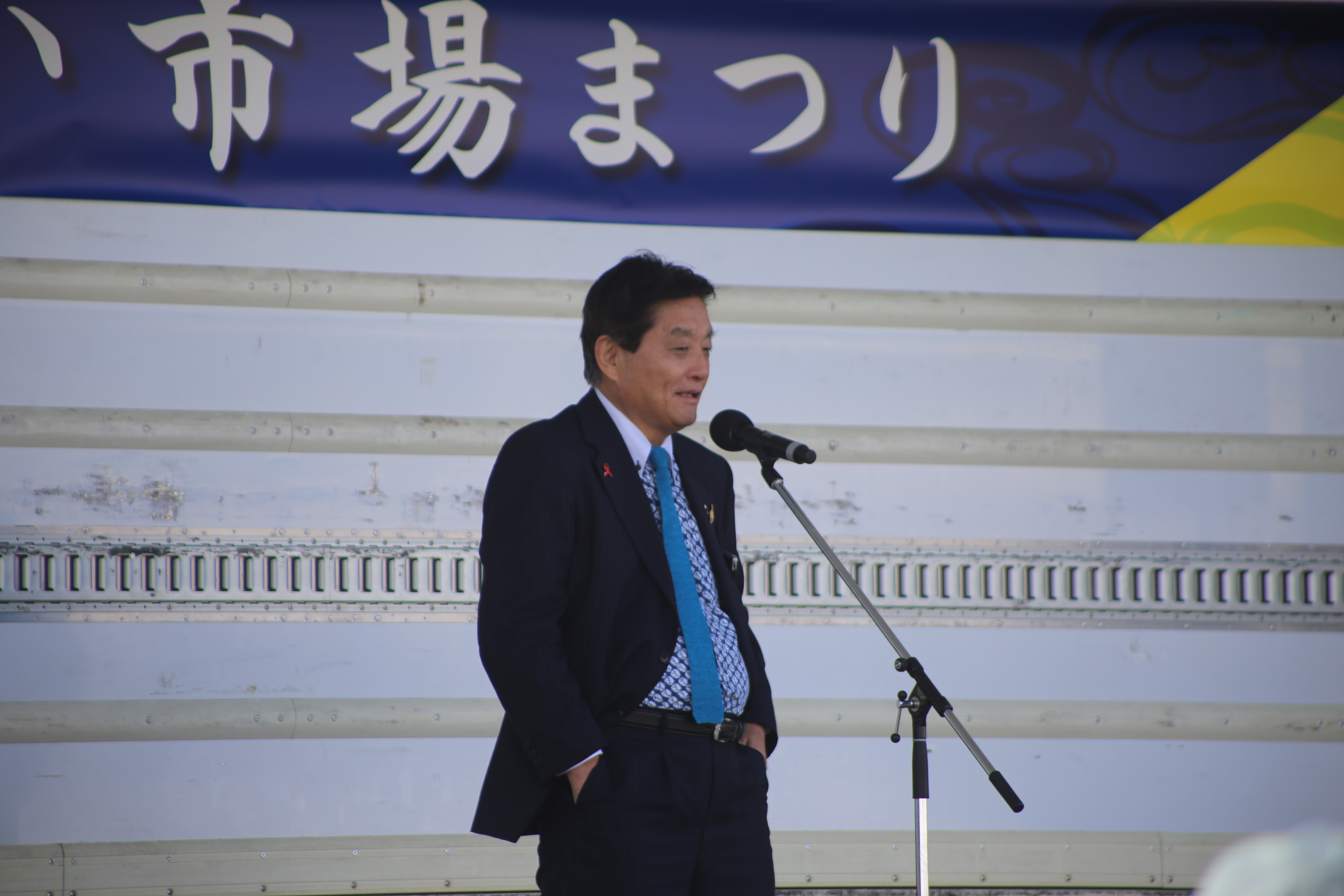 河村たかし名古屋市長